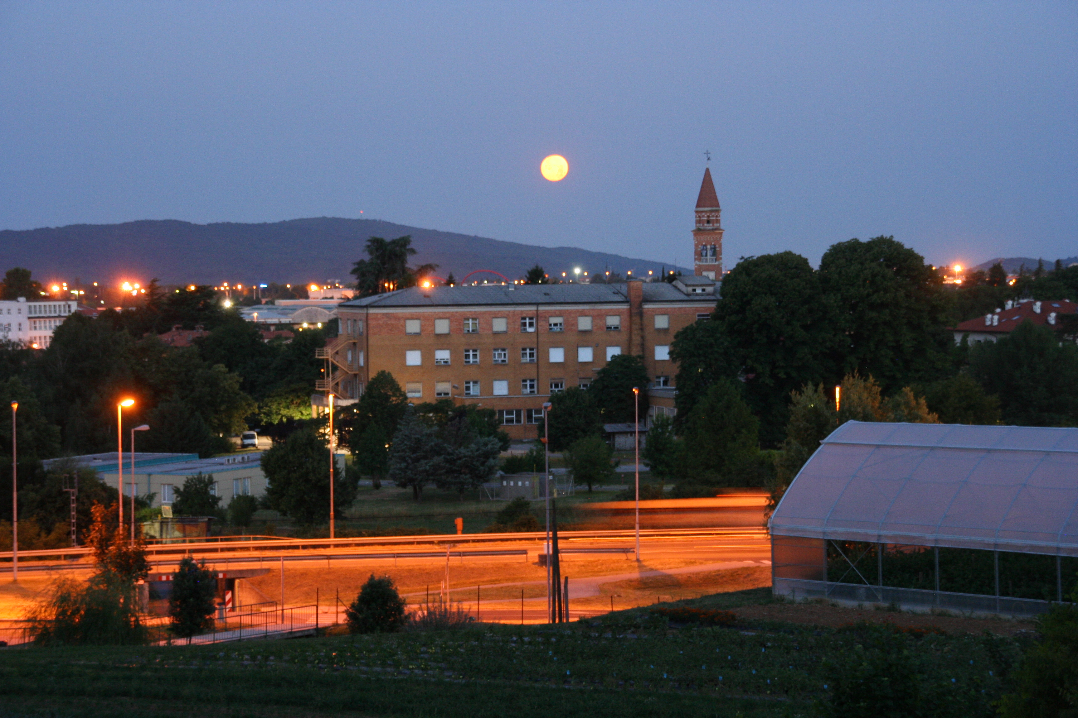 Residencia donde nos alojamos en el Coro de Cámara Ainur.